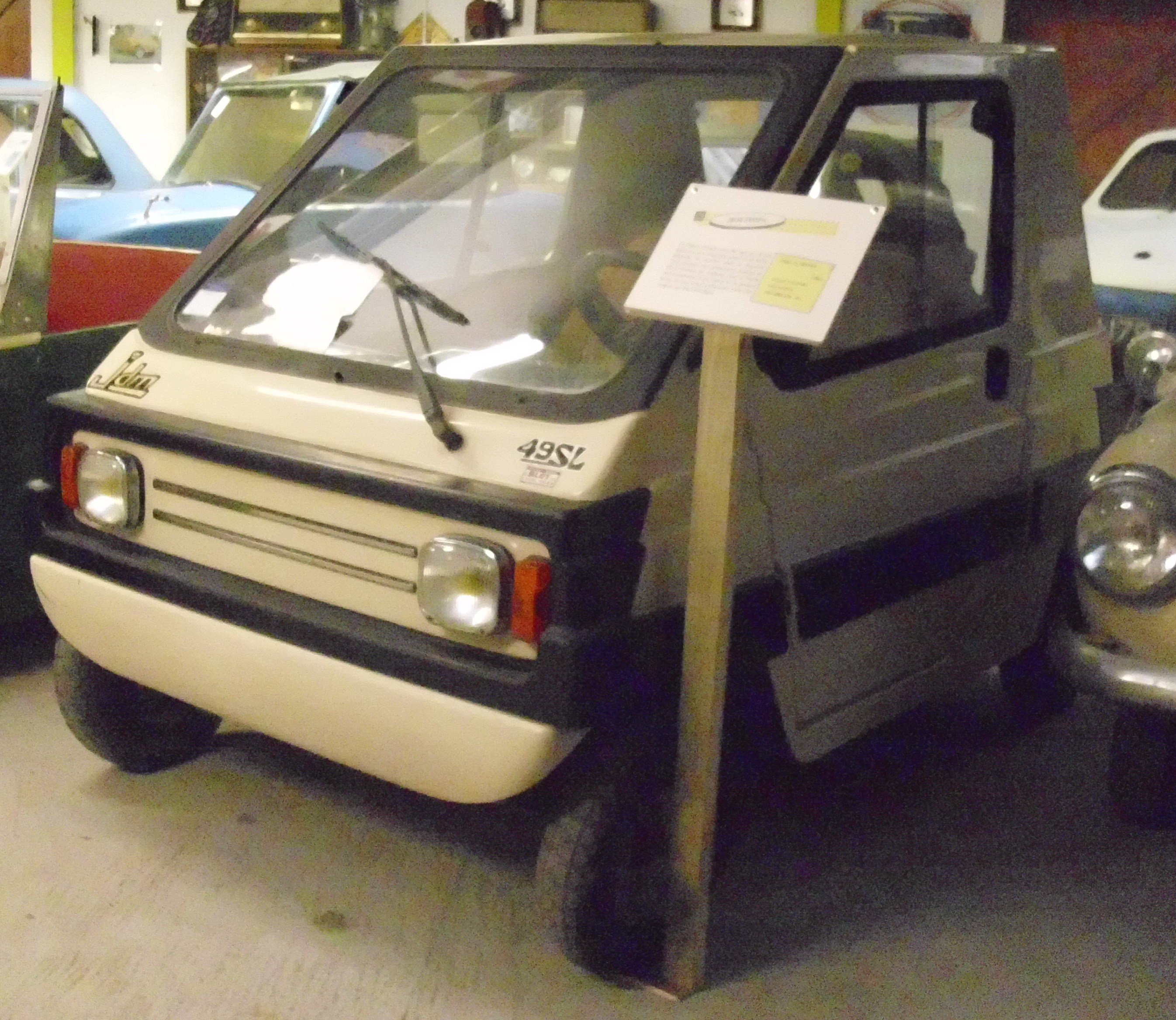 JDM 1981